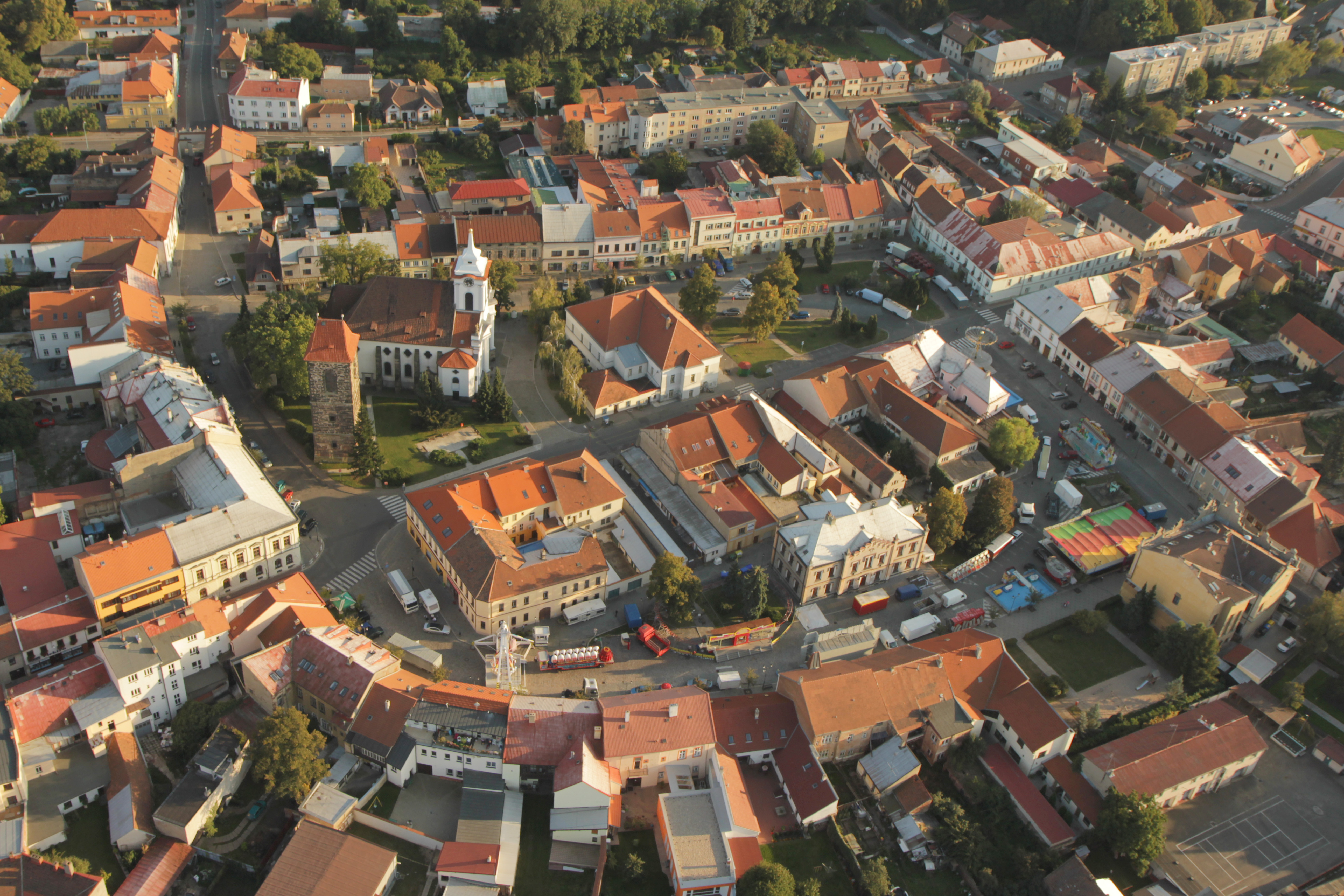 Kostel sv. Gottharda (Český Brod), nám. Arnošta z Pardubic, Český Brod